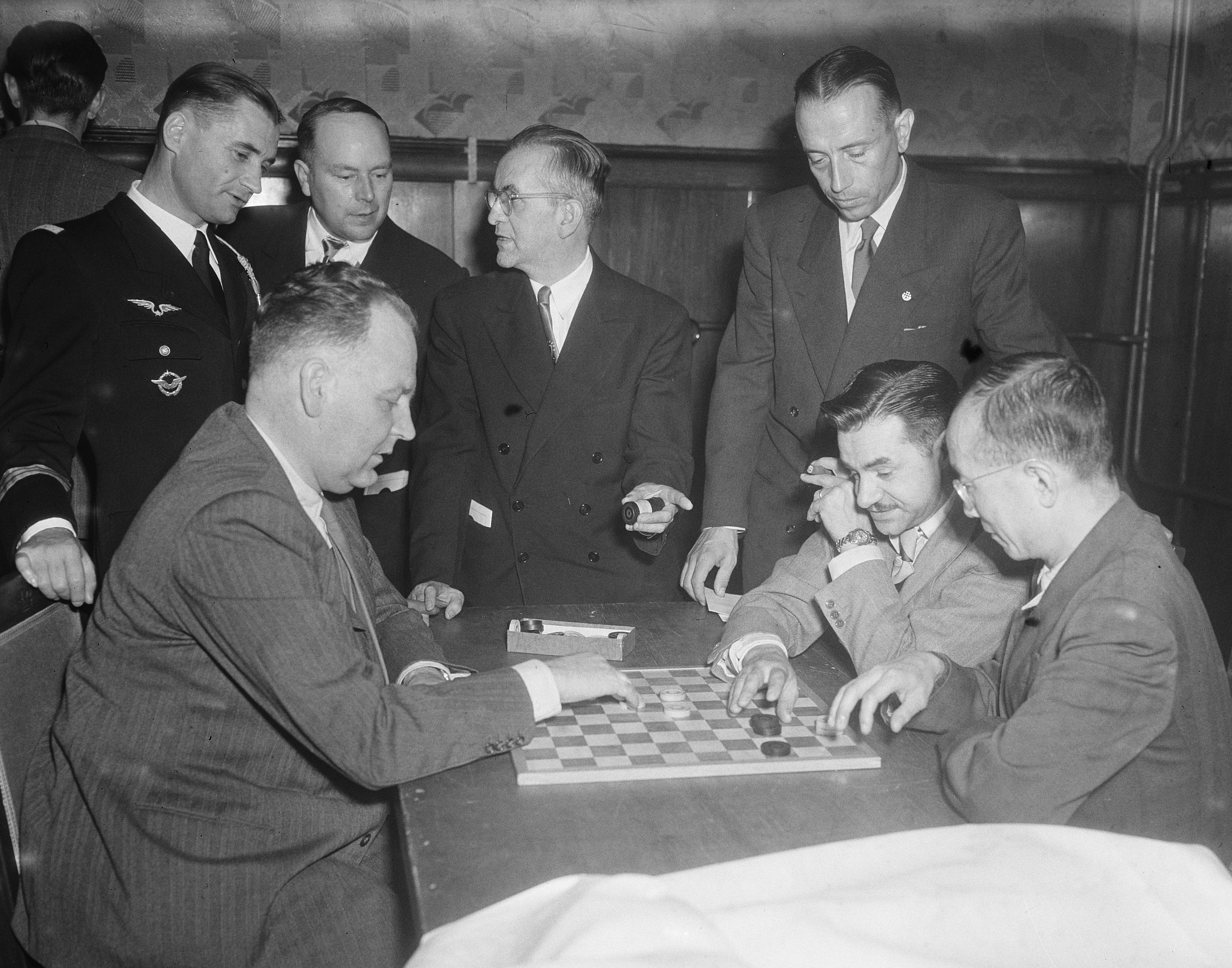 Ontvangst deelname Wereldkampioenschappen Dammen Amsterdam